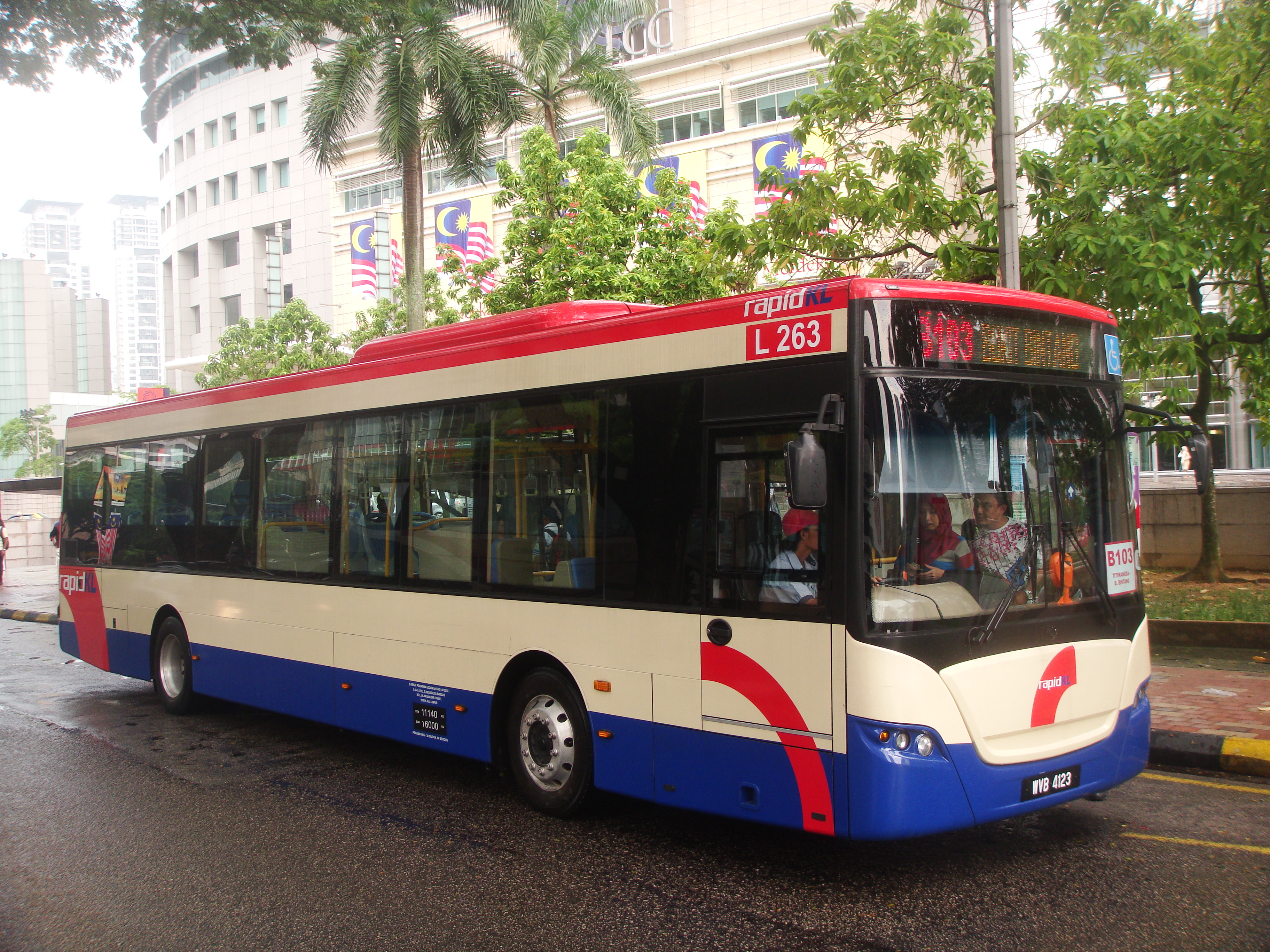 A King Long XMQ6121G bus operated by RapidKL in Kuala Lumpur, Malaysia.